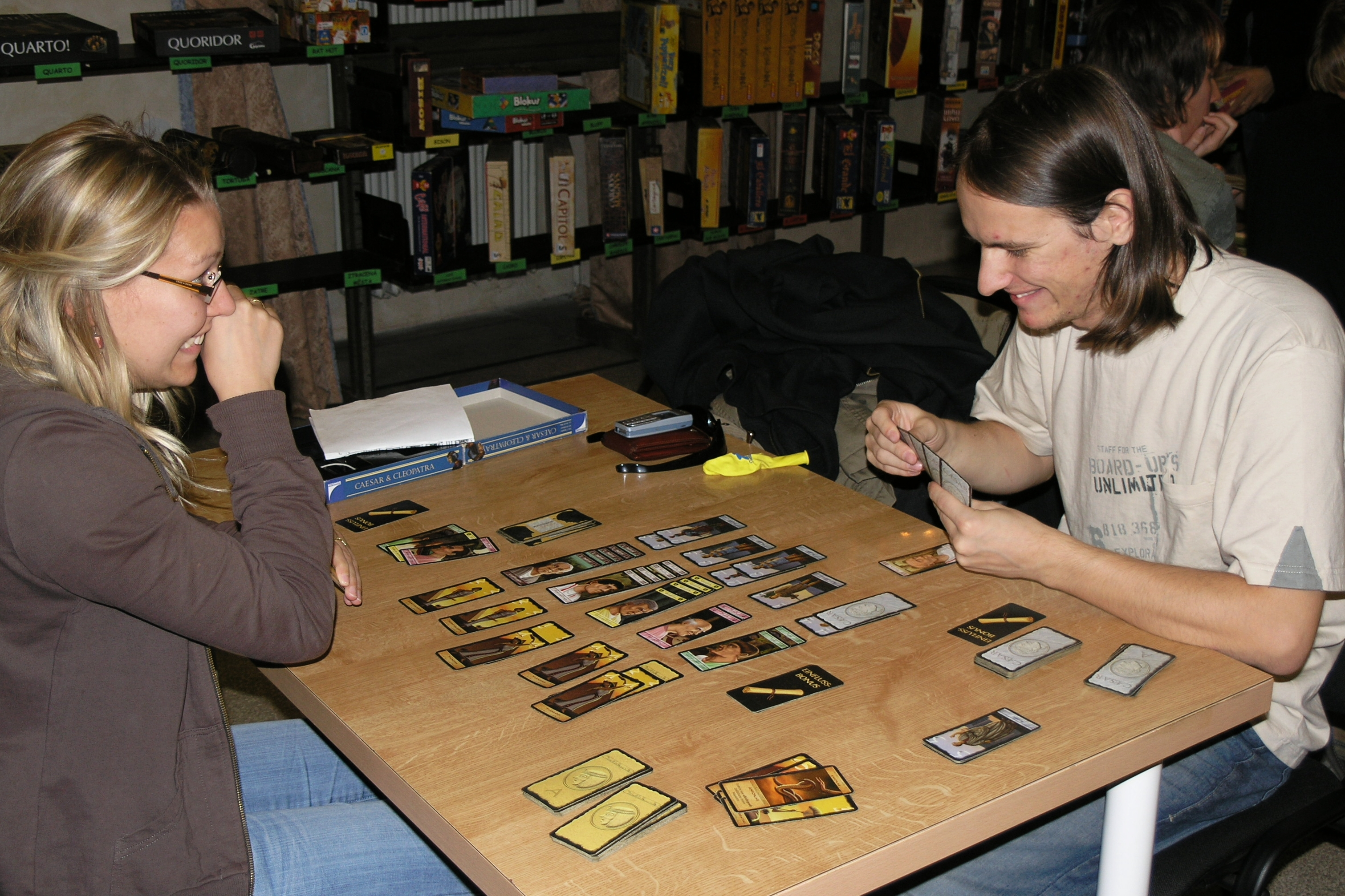 Deskohraní 2008